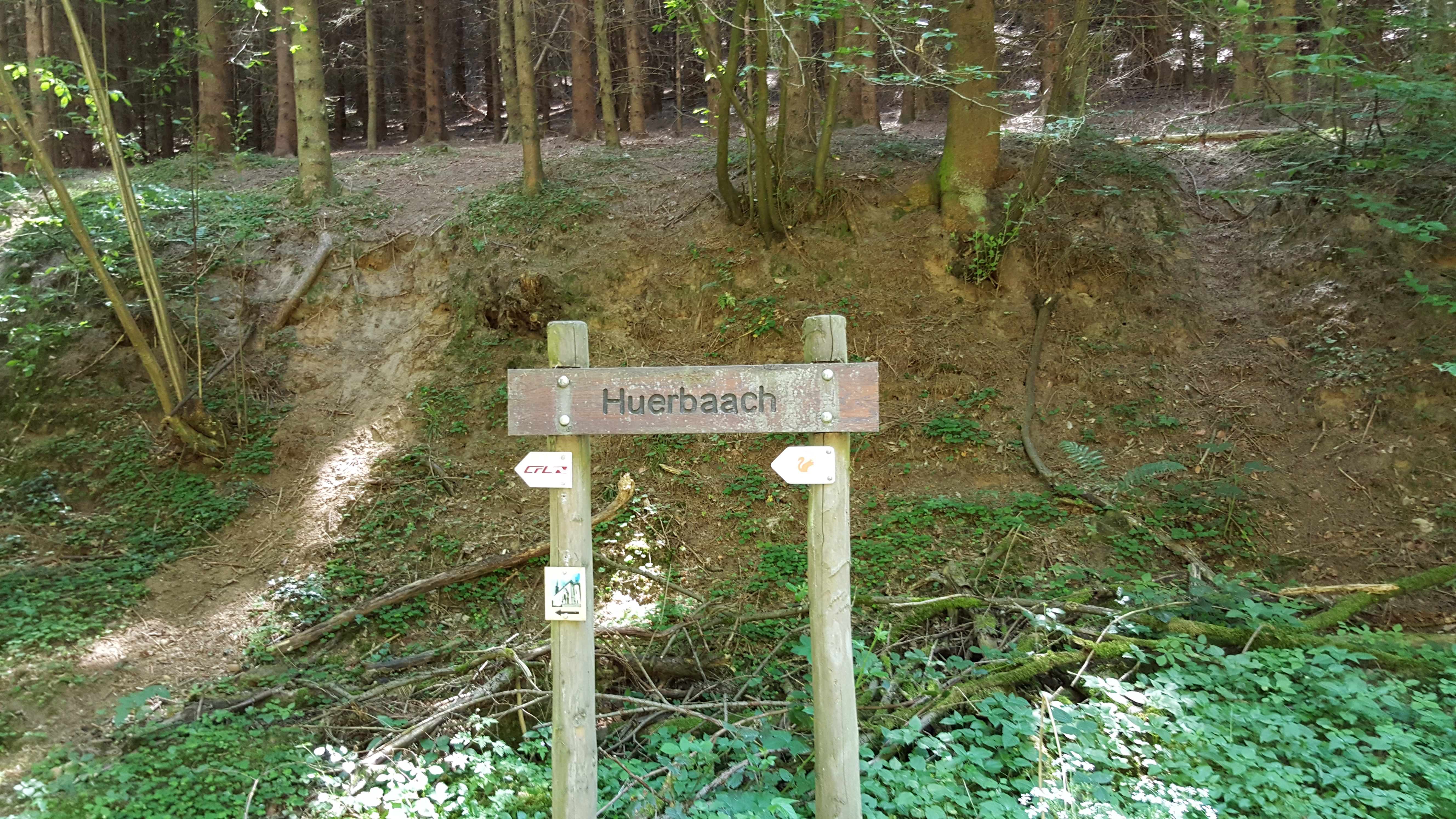 Panneau vun der Huerbaach